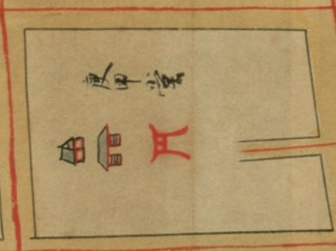 館林青梅天満宮 綱吉時代の青梅天満宮付近 庚申堂の文字が見える 〔日本古城絵図〕 東山道之部（4）. 165 館林御城図より抜粋